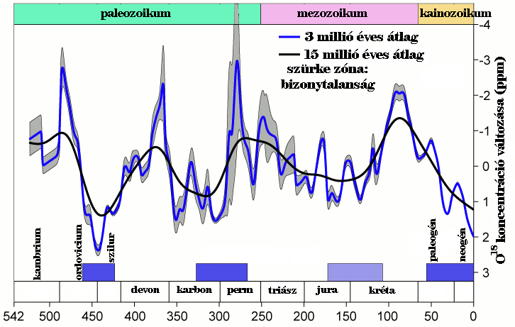 Az utóbbi félmilliárd év éghajlati grafikonja O18 koncentráció méréséből számítva